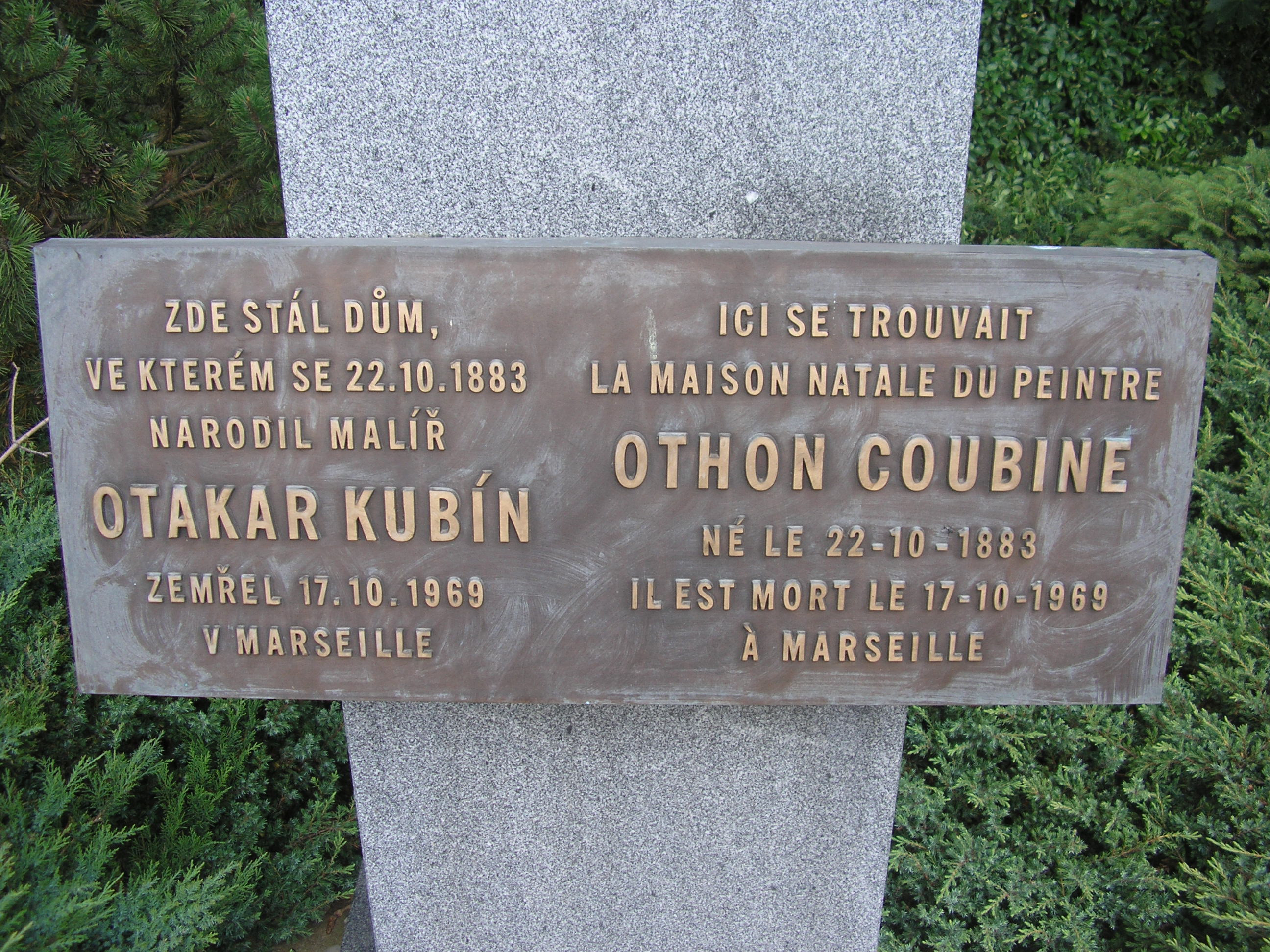 Památník Otakara Kubina v Boskovicich